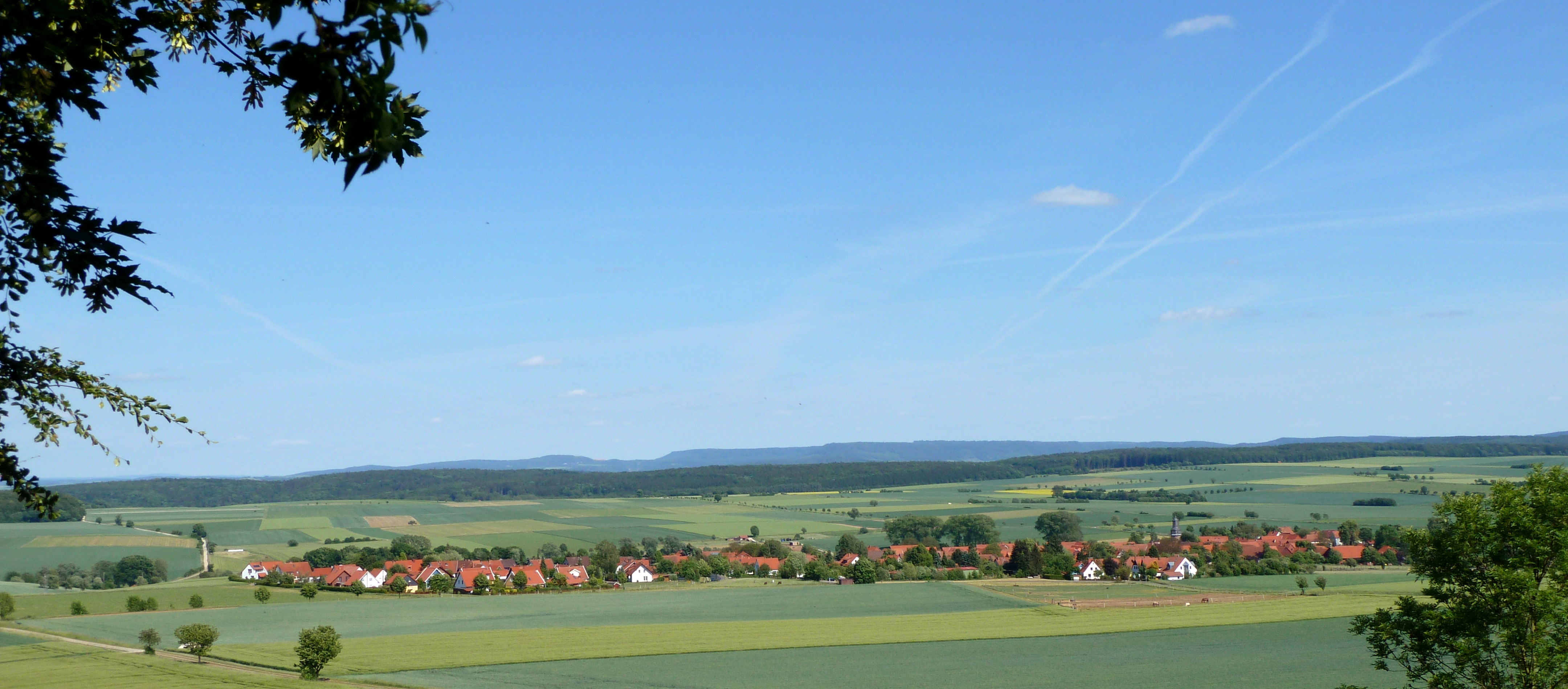 Blick von Westen vom "Alten Kaiser" auf Sattenhausen, Gemeinde Gleichen, Landkreis Göttingen